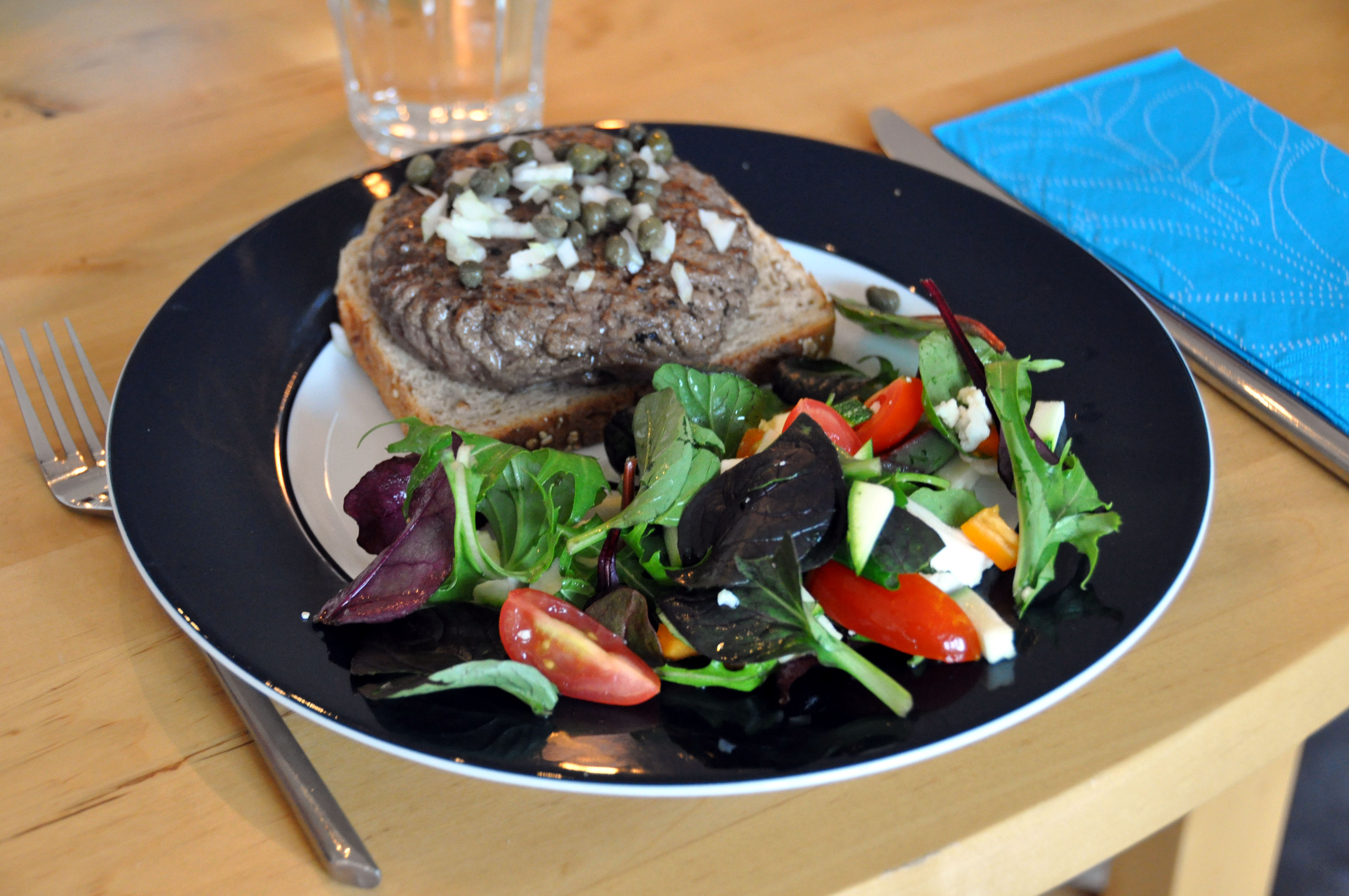 Pariserbøf med salat